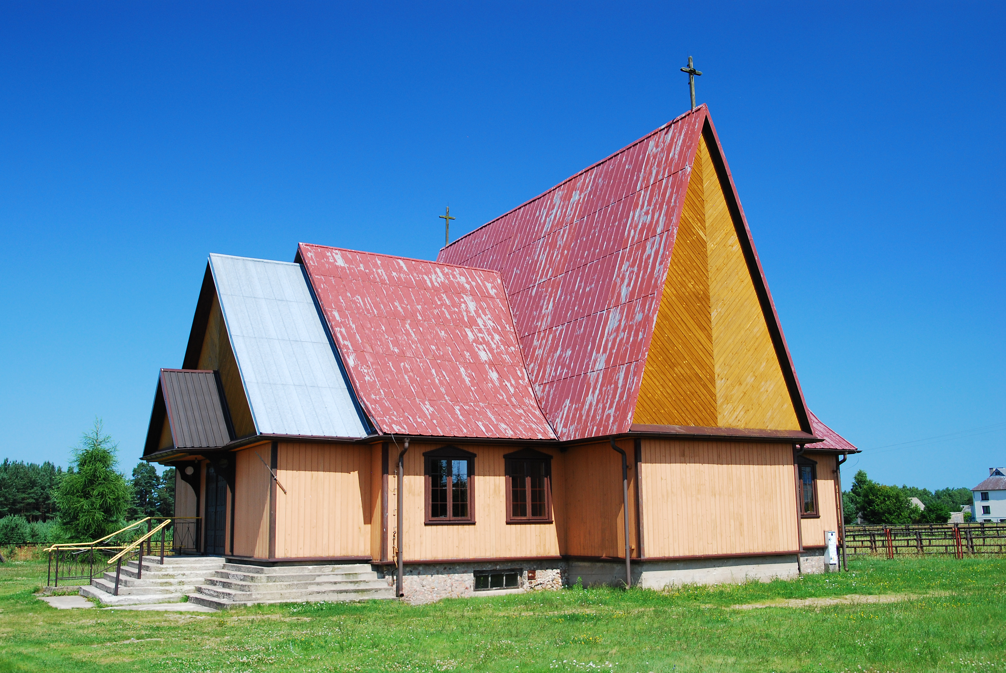 Płaska - rzymskokatolicka kaplica filialna p.w. Miłosierdzia Bożego, 1982 This photo from Podlaskie Voievodeship was taken during Polish Wikiexpedition 2009 set up by Wikimedia Polska Association. The making of this document was supported by Wikimedia Polska.